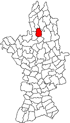 Categorie:Hărţi ale judeţului Olt